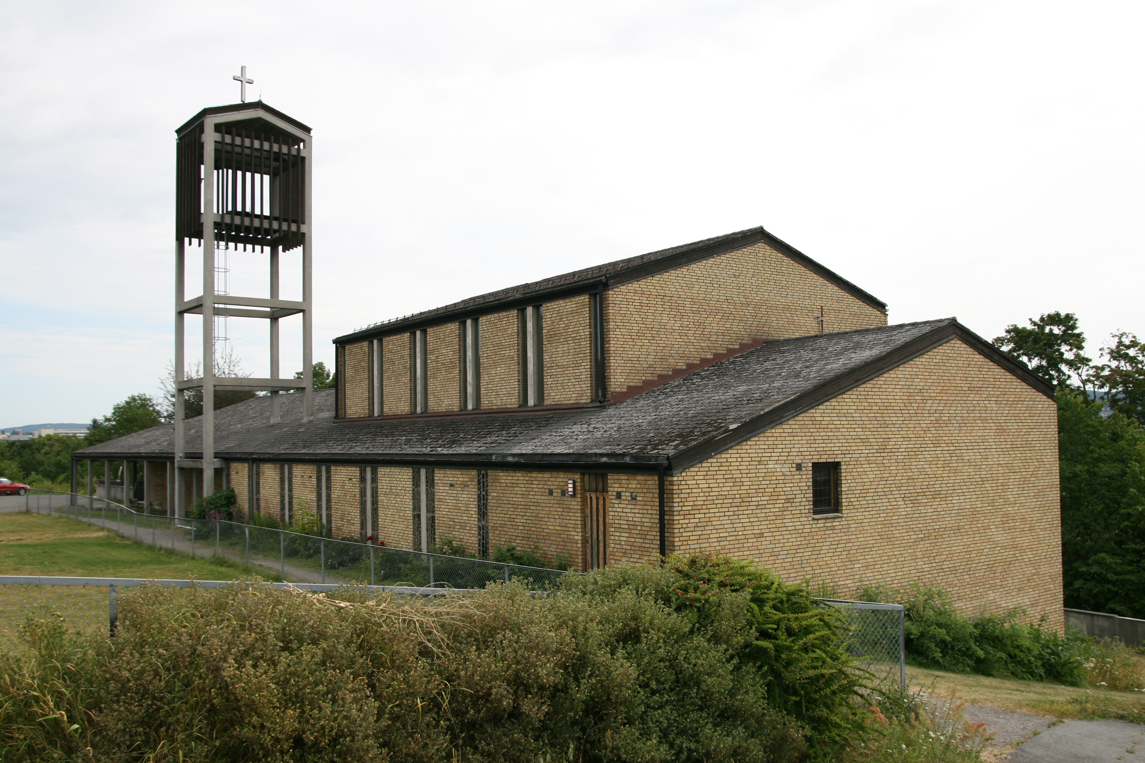 Hasle kirke, Oslo.